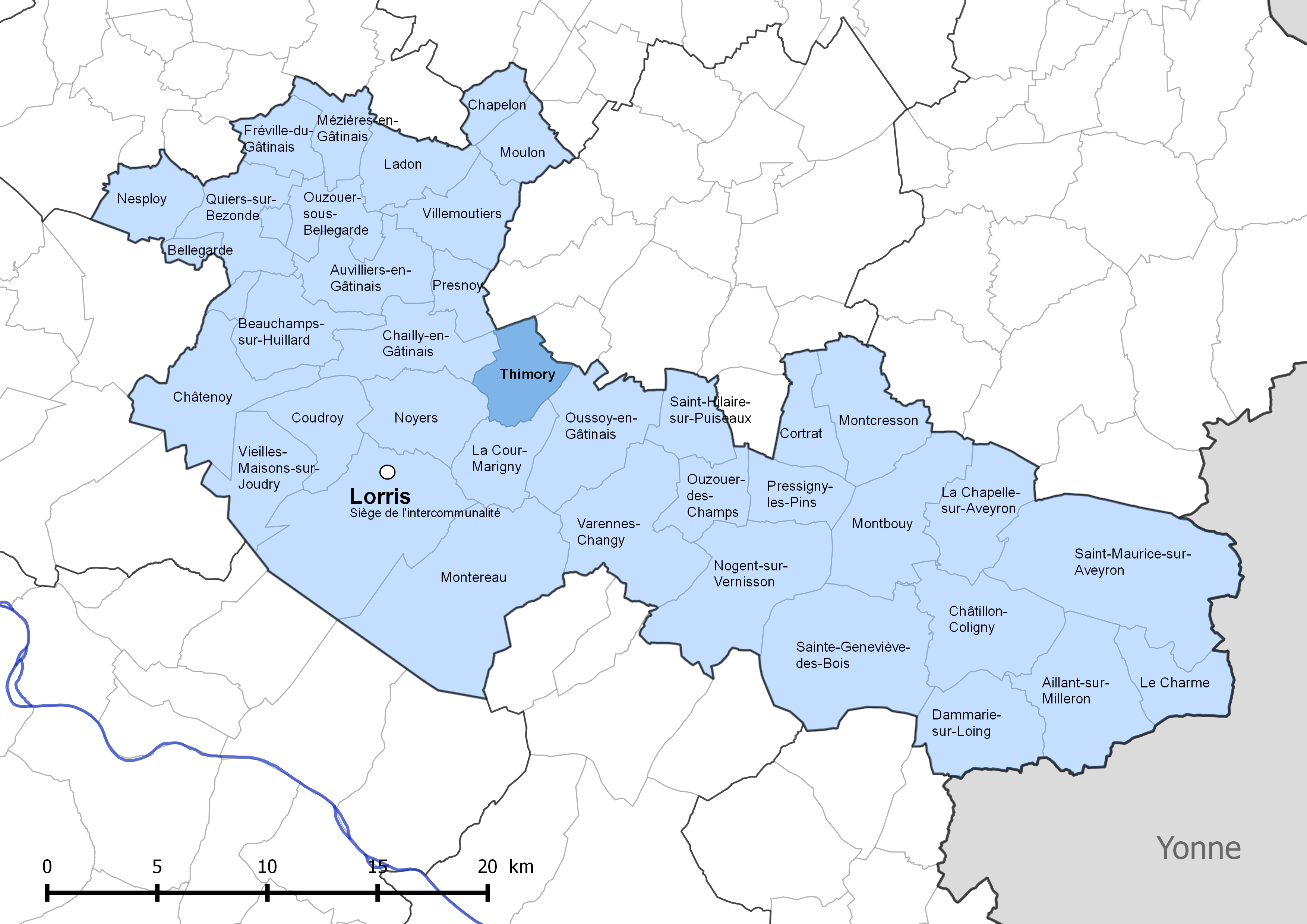 Périmètre de la communauté de communes Canaux et forêts en Gâtinais - Situation de la commune de Thimory.